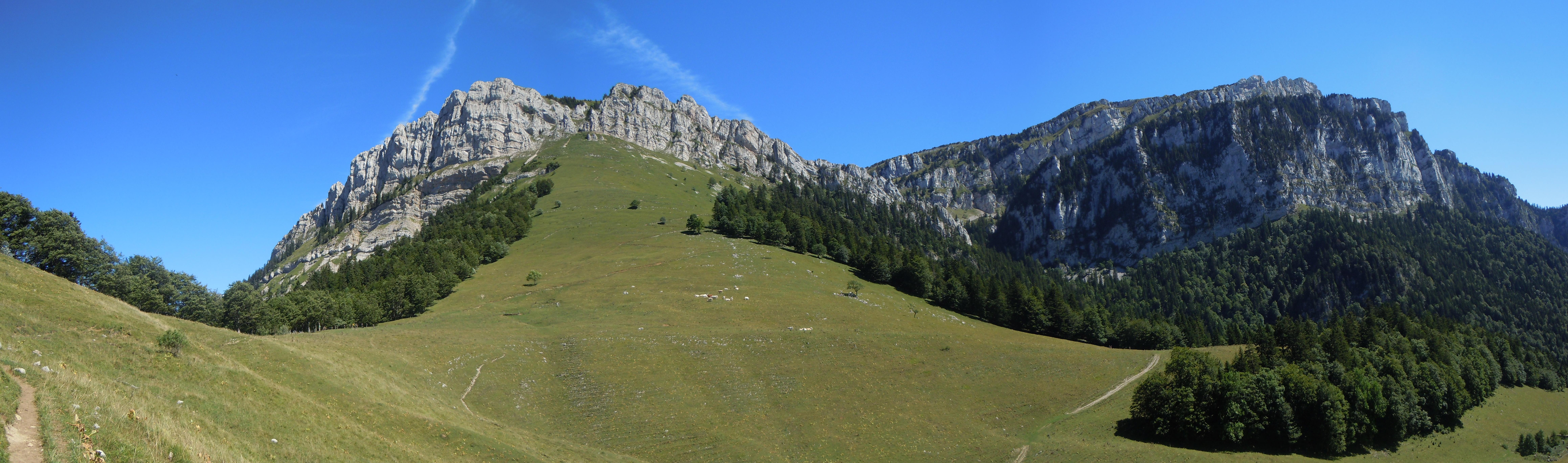 Col de la Ruchère et Petit Som - Charteuse - Savoie - France